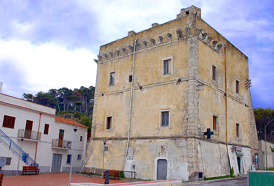 SAN MENAIO (FG) - La Torre dei Preposti, fortificazione che si affaccia sul mare. Alle sue spalle i lembi della "Pineta Marzini", foresta monumentale di pini d'aleppo.